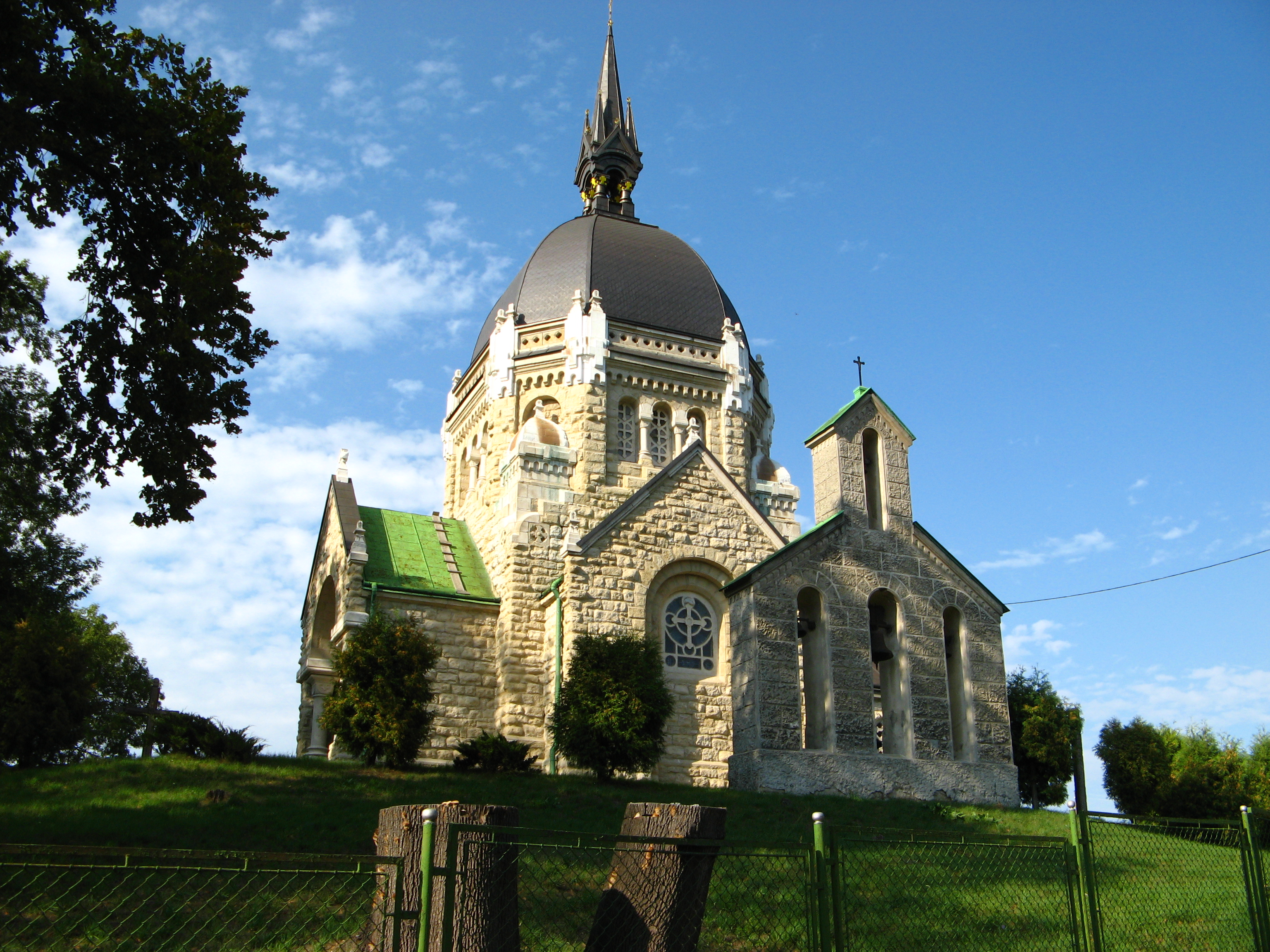 Церква Знесіння (Львів)